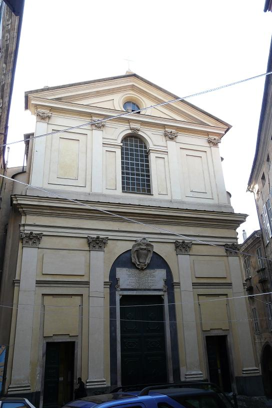 Basilica dei Santi Giacomo e Filippo, Taggia, Liguria, Italy